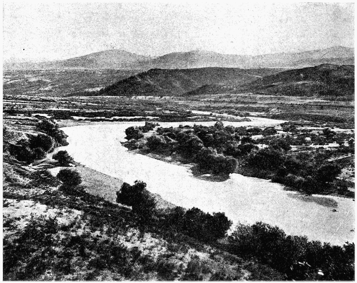 vallée du petit zab à bechast